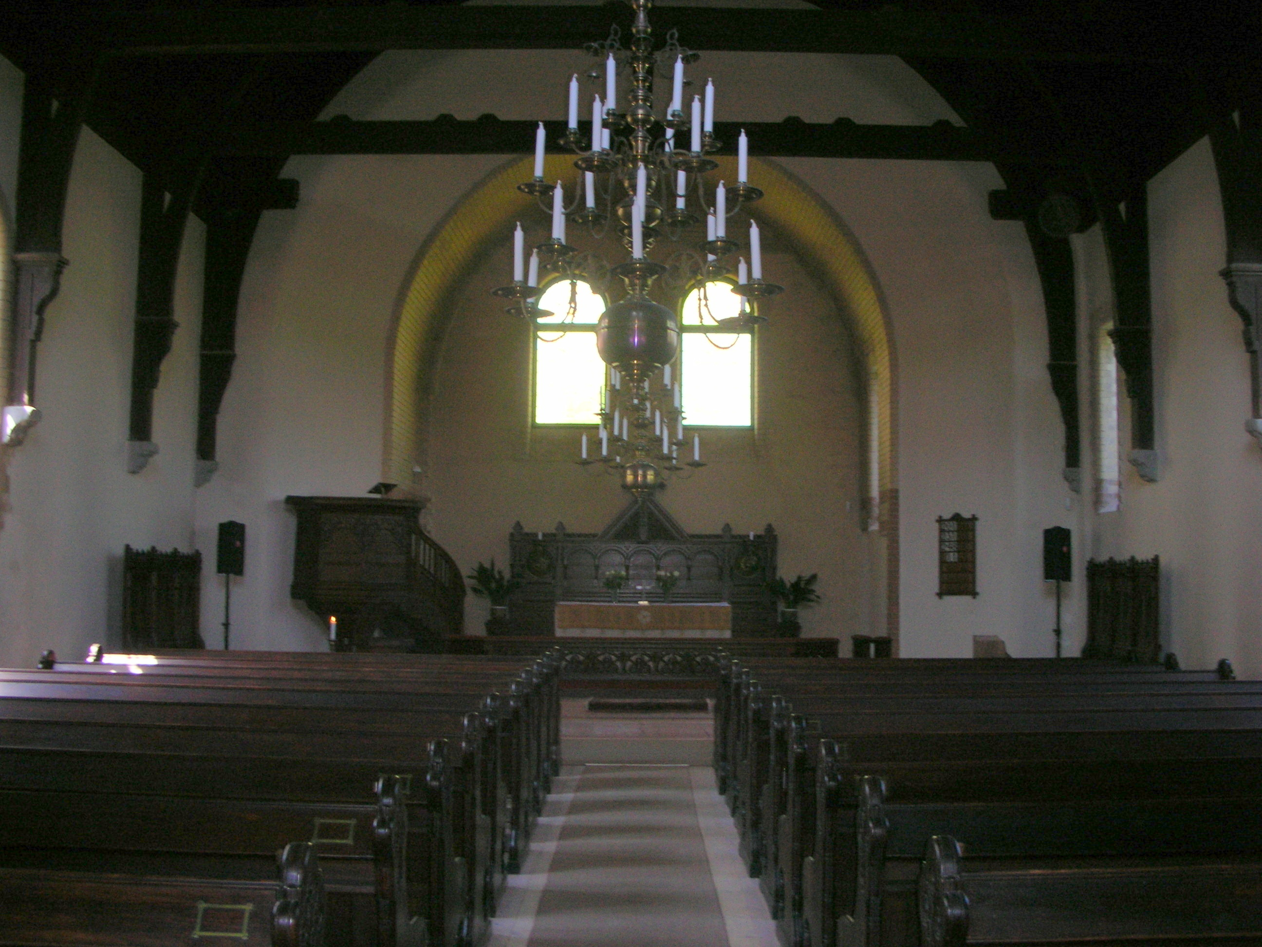 Interiör från Tjolöholms kyrka.